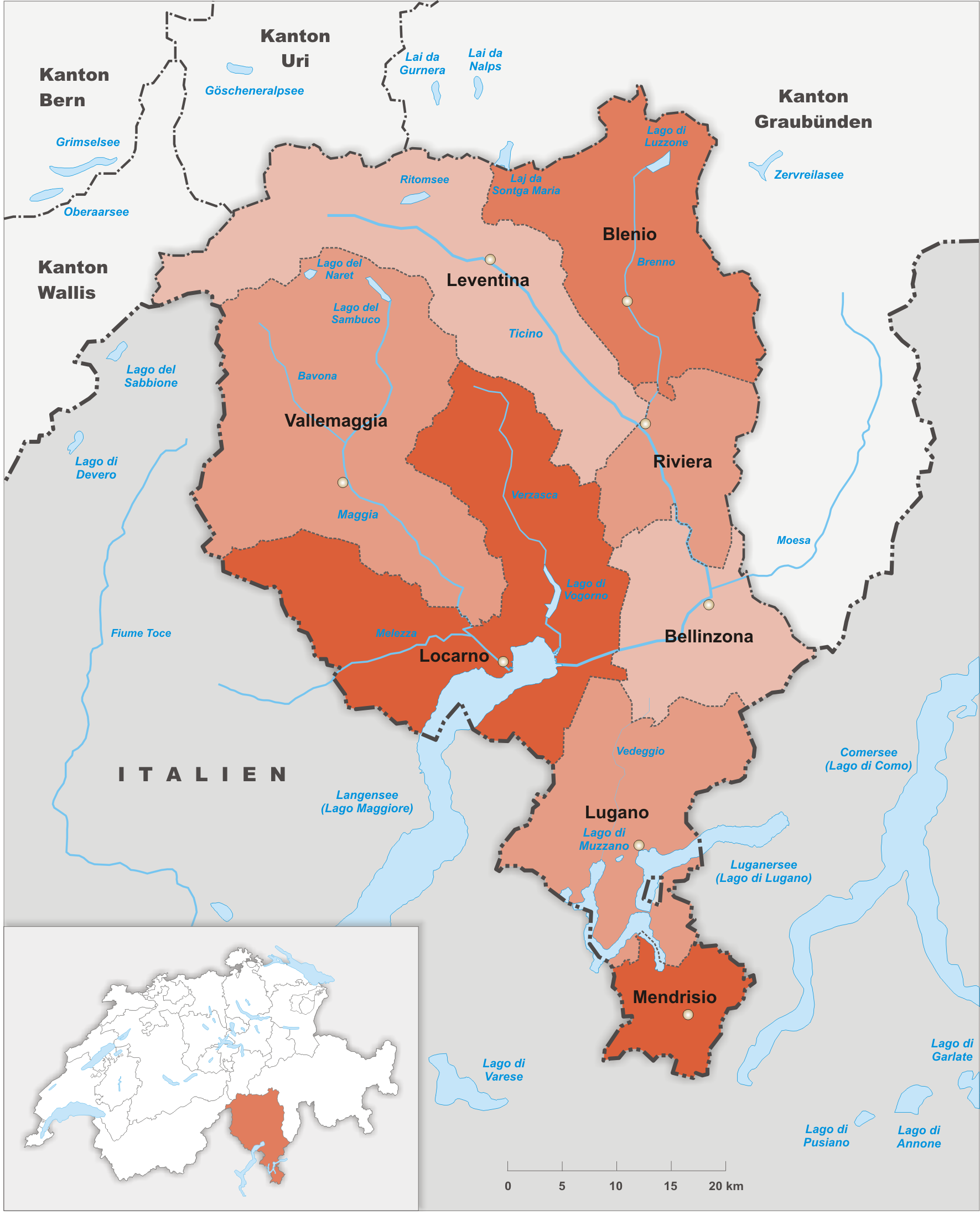 Bezirke des Kanton Tessin